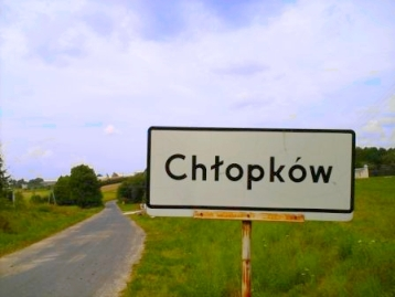 Příjezd do města Chłopków, Polsko